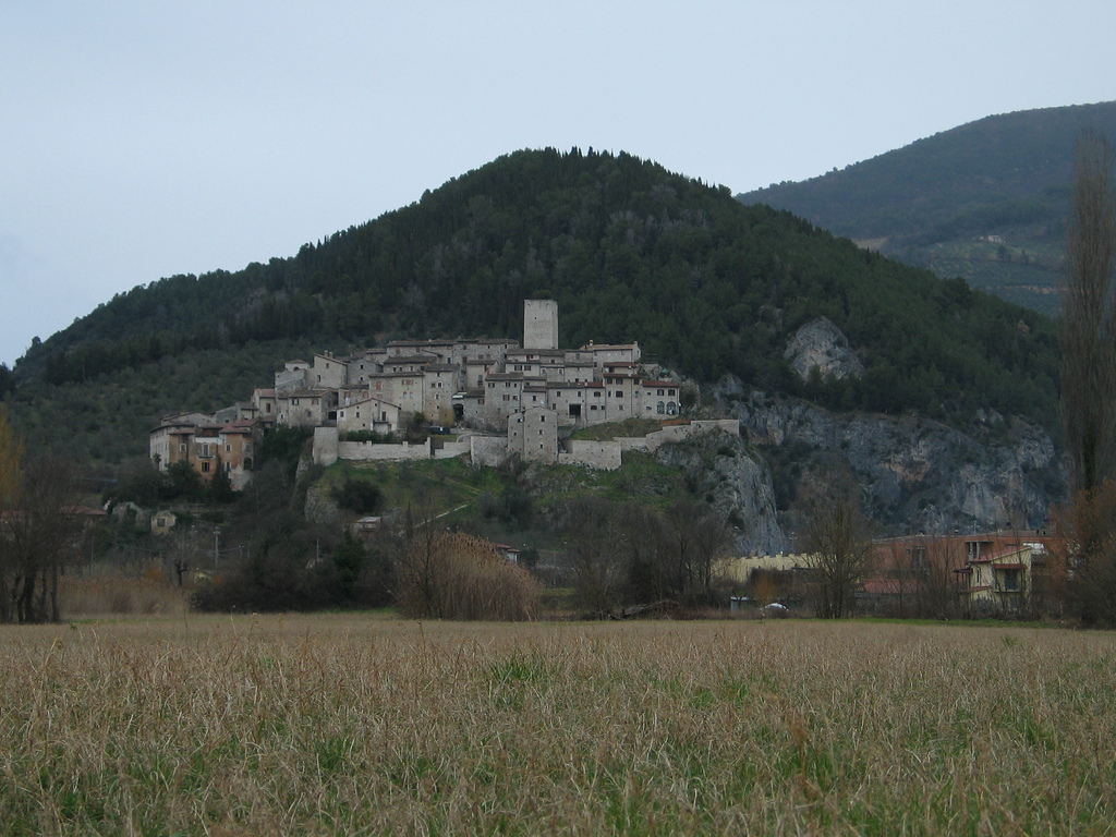 Arrone Marzo 2006